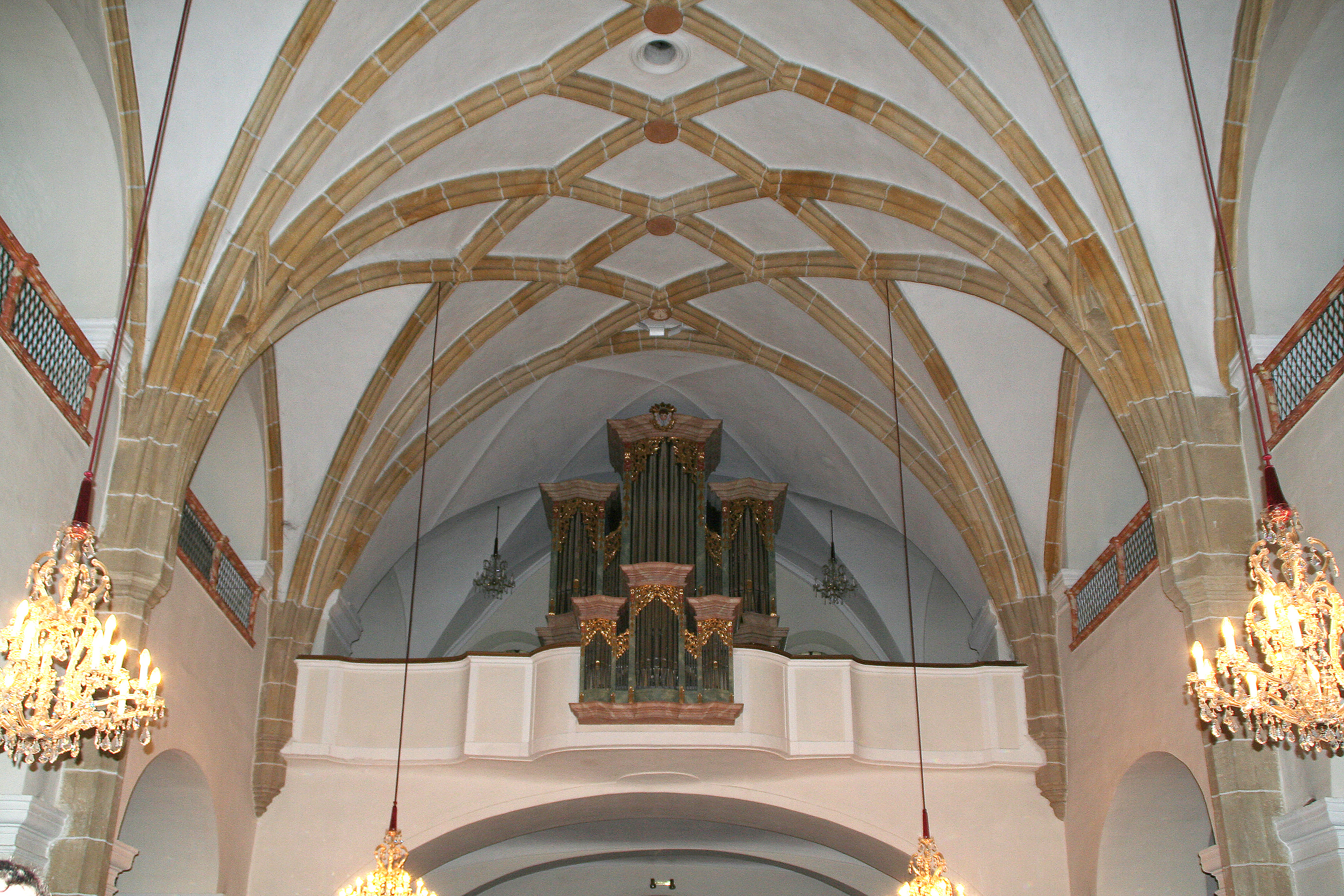 Pfarrkirche Gross St. Florian, Kirchenschiff in Richtung Westen